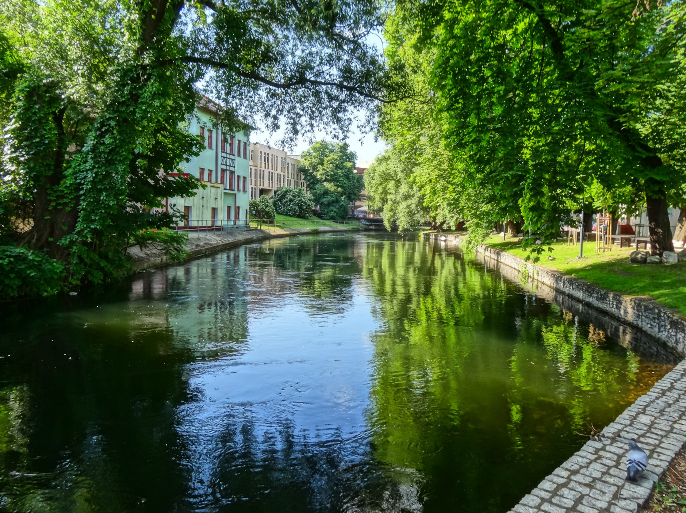 Odnoga Brdy Młynówka opływająca Wyspę Młyńską w Bydgoszczy